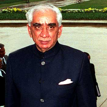 ജസ്വന്ത് സിംഹ്